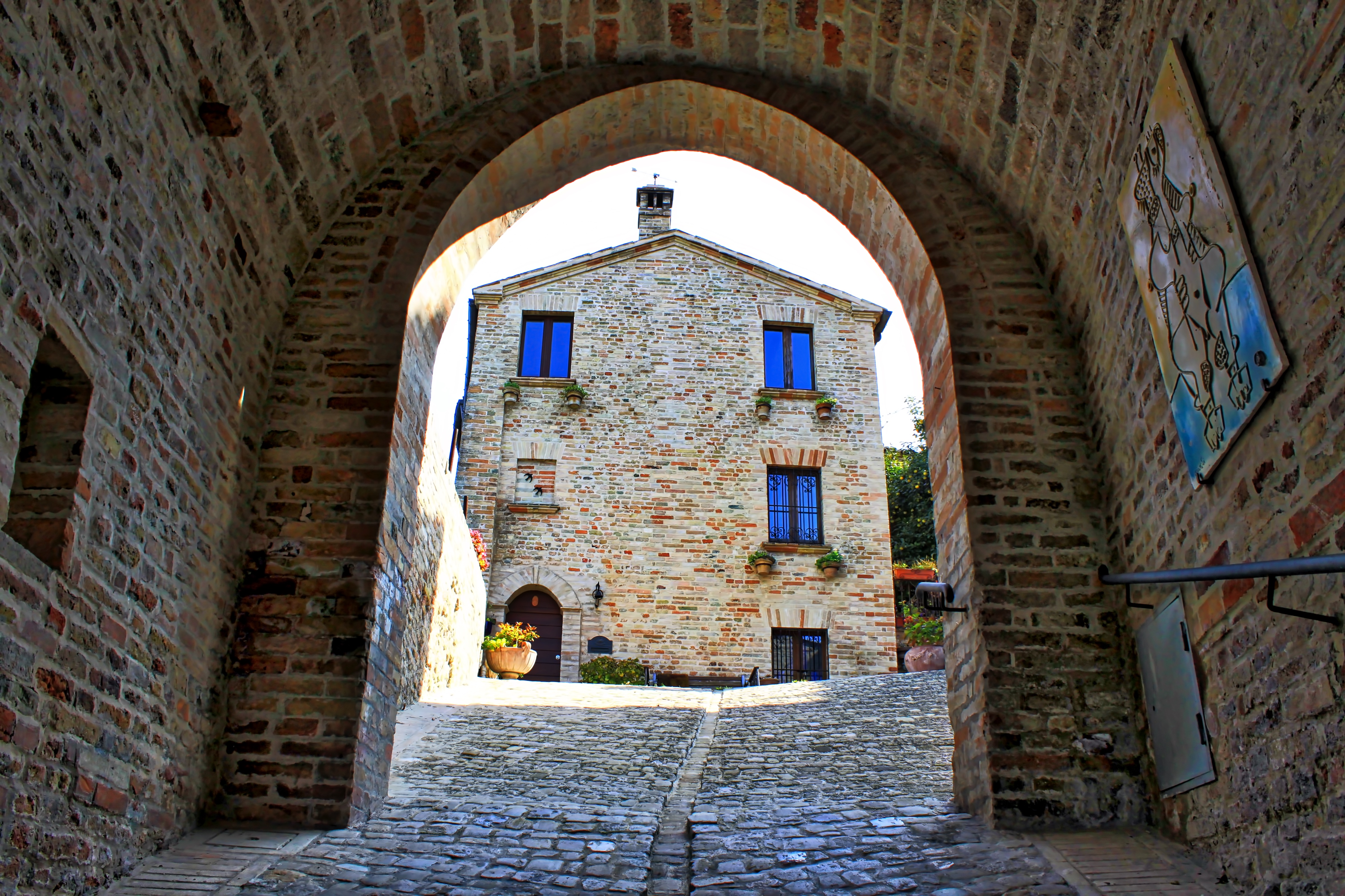 L'antica porta settentrionale del Castello Vecchio, la più bella e suggestiva. Si vedono le strutture medievali ed è uno dei luoghi più fotografati del paesino della provincia di Ascoli Piceno.